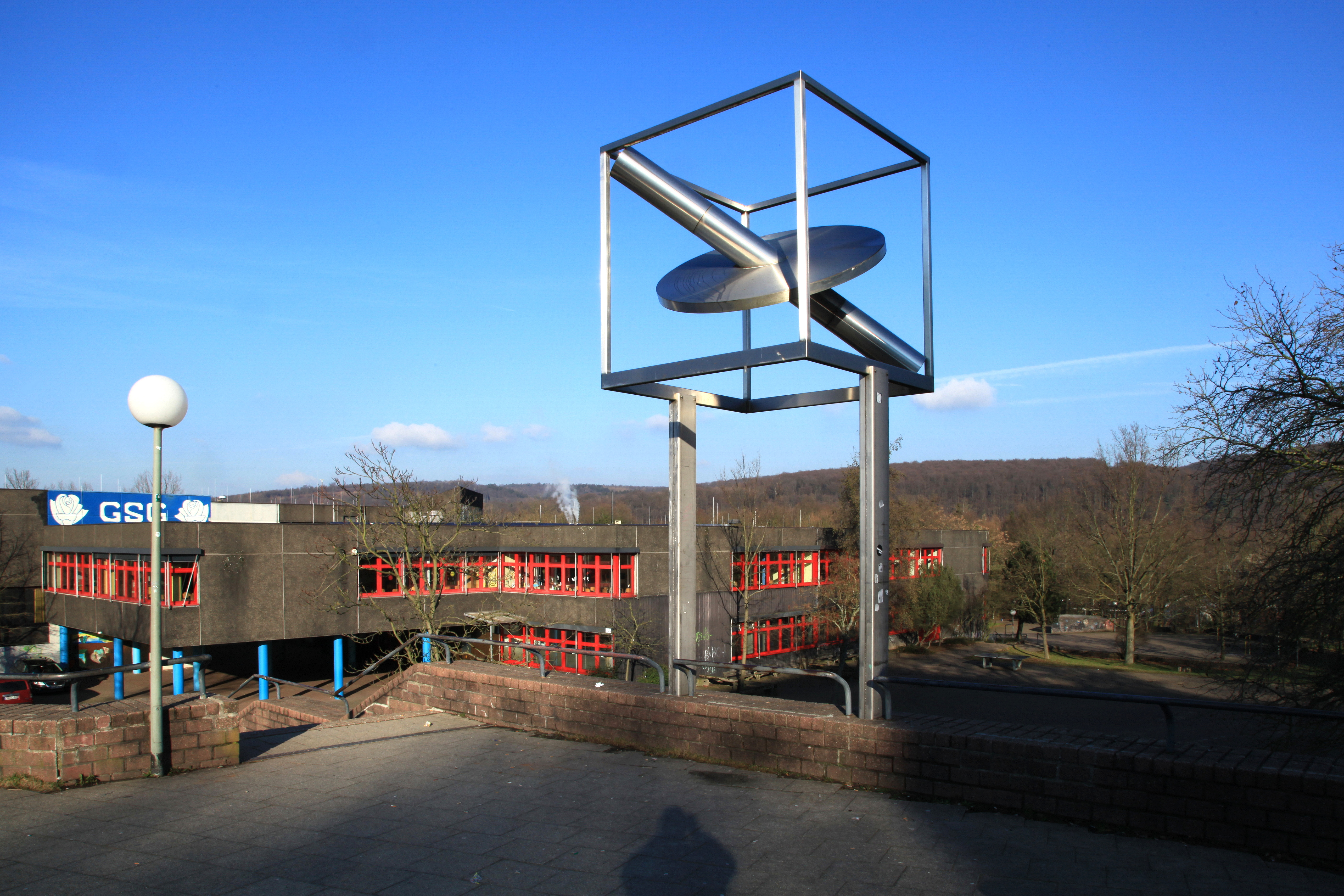 Geschwister-Scholl-Gymnasium, Hoffmann-von-Fallersleben-Straße 28 in Wetter (Ruhr)